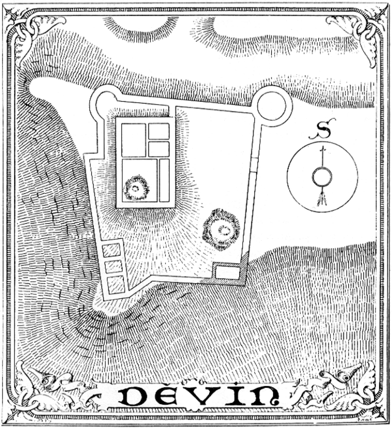 Půdorys hradu od Vojtěcha Krále z Dobré Vody publikovaný roku 1891; stav na počátku 19. století